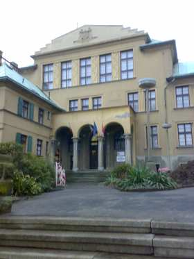 Portal der ehem. Höheren Technischen Lehranstalt Bodenbach/Elbe. Höhere Technische Lehranstalt und Handelschule in Bodenbach (1924), jetzt Gewerbeschule in Děčín-Letná, Slovanská 1000/55 und 1001/57.